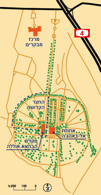 Bahai_gardens_in_Acre_map